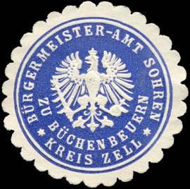 Sealing stamp Title: Bürgermeister - Amt Sohren zu Büchenbeuern - Kreis Zell Description: blau, weiß, geprägt Place: Sohren size: 4 cm